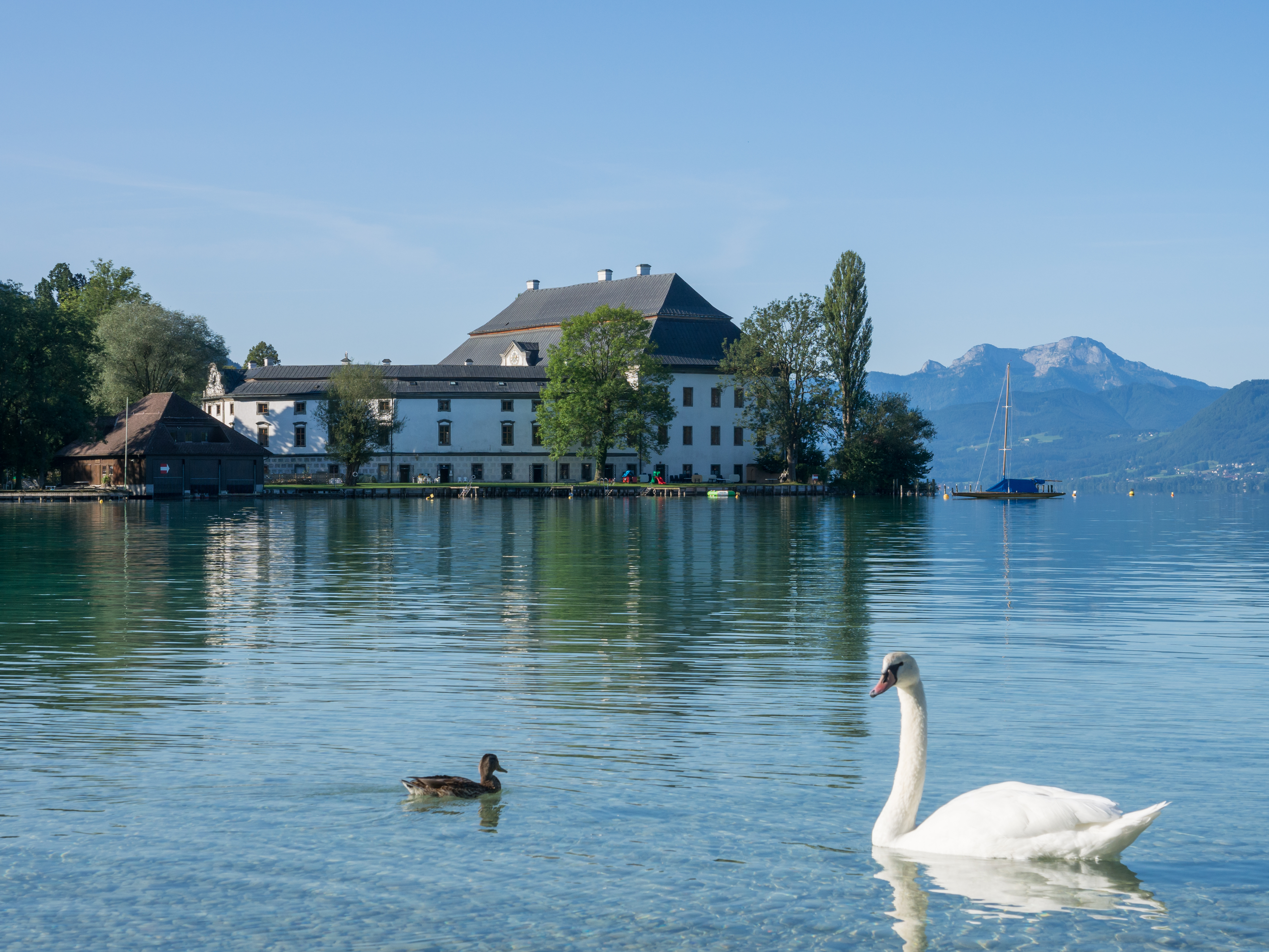 Blick von der Uferpromenade in Seewalchen auf Schloss Kammer und den Schafberg